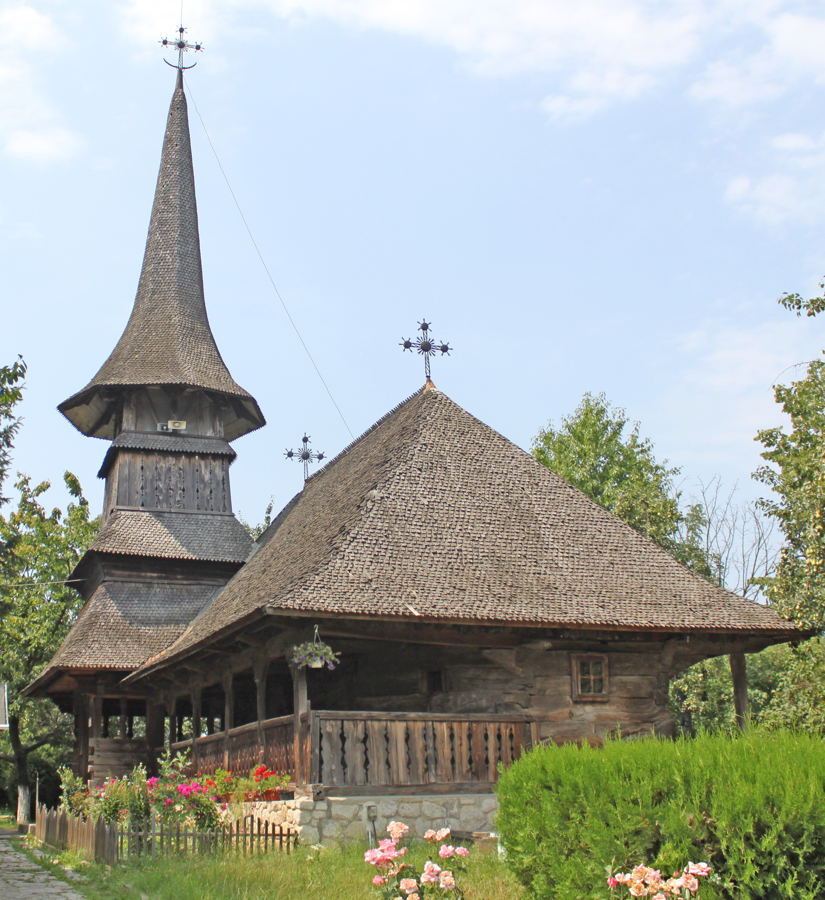 Biserica de lemn din Luieriu, judeţul Mureş acum biserica schitului Sf.Maria-Cricov de lângă oraşul Urlaţi, judeţul Prahova.